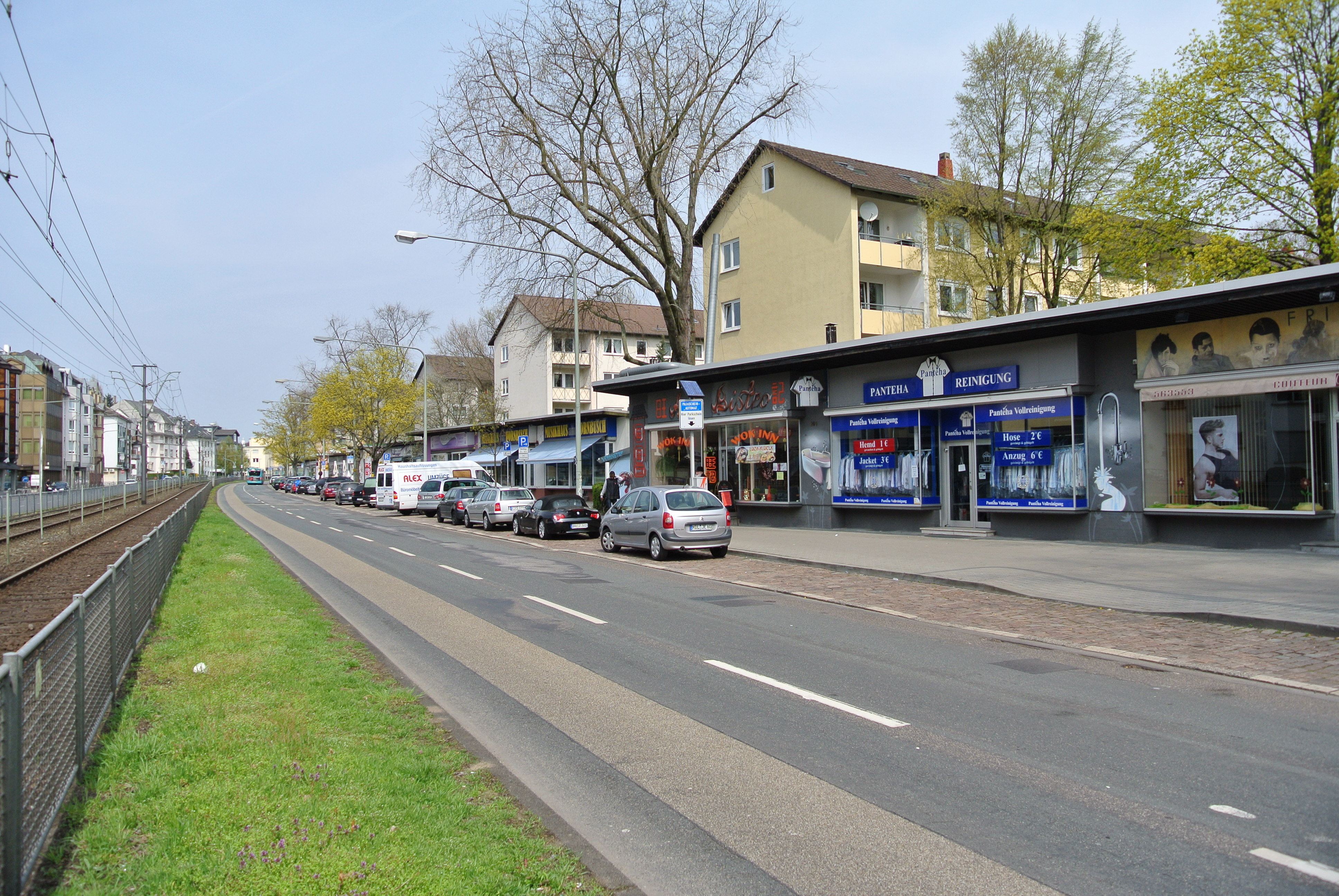 Dornbusch-Siedlung, Ladenpavillons an der Eschenheimer Landstraße